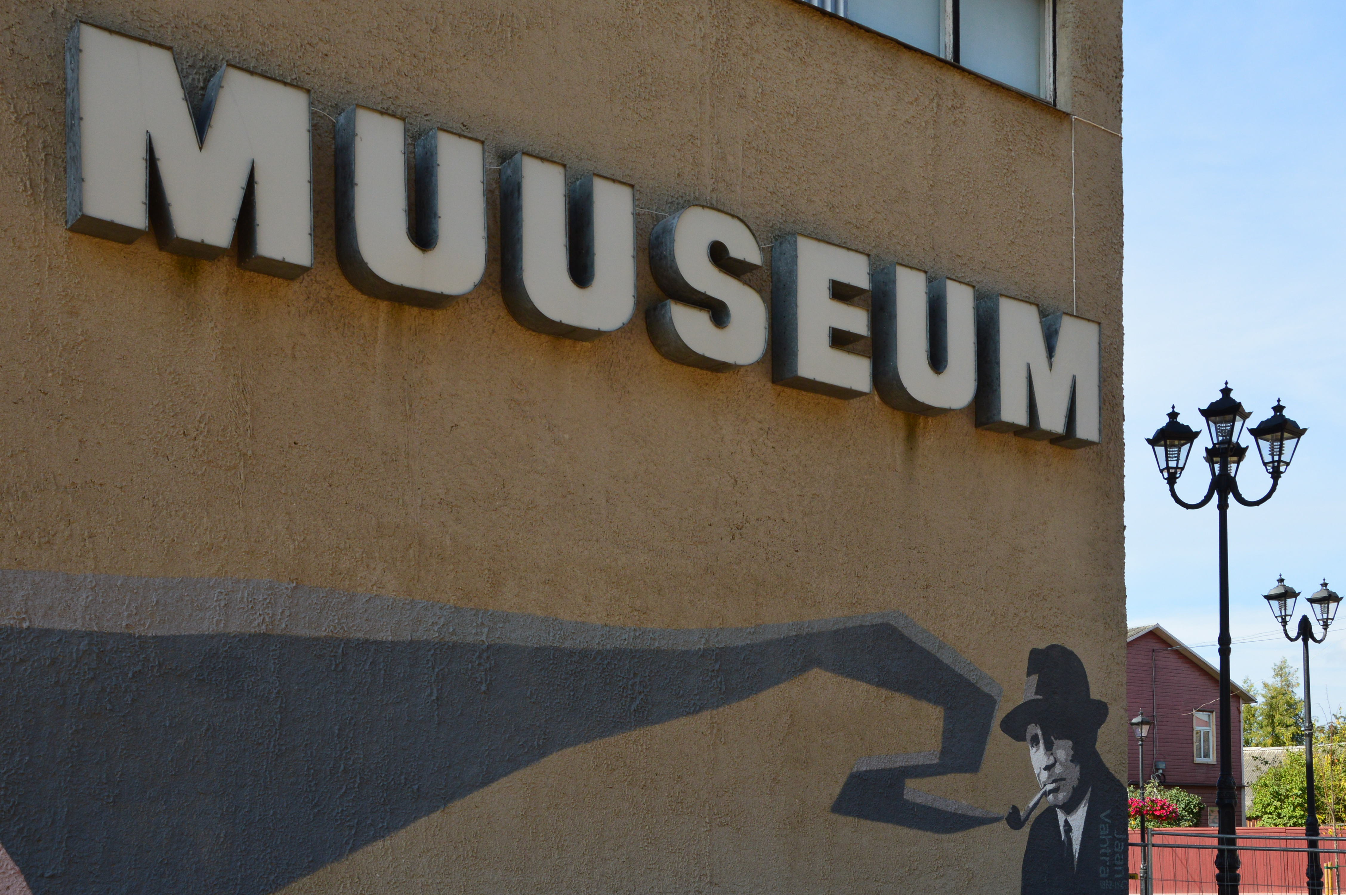 Võrumaa muuseum